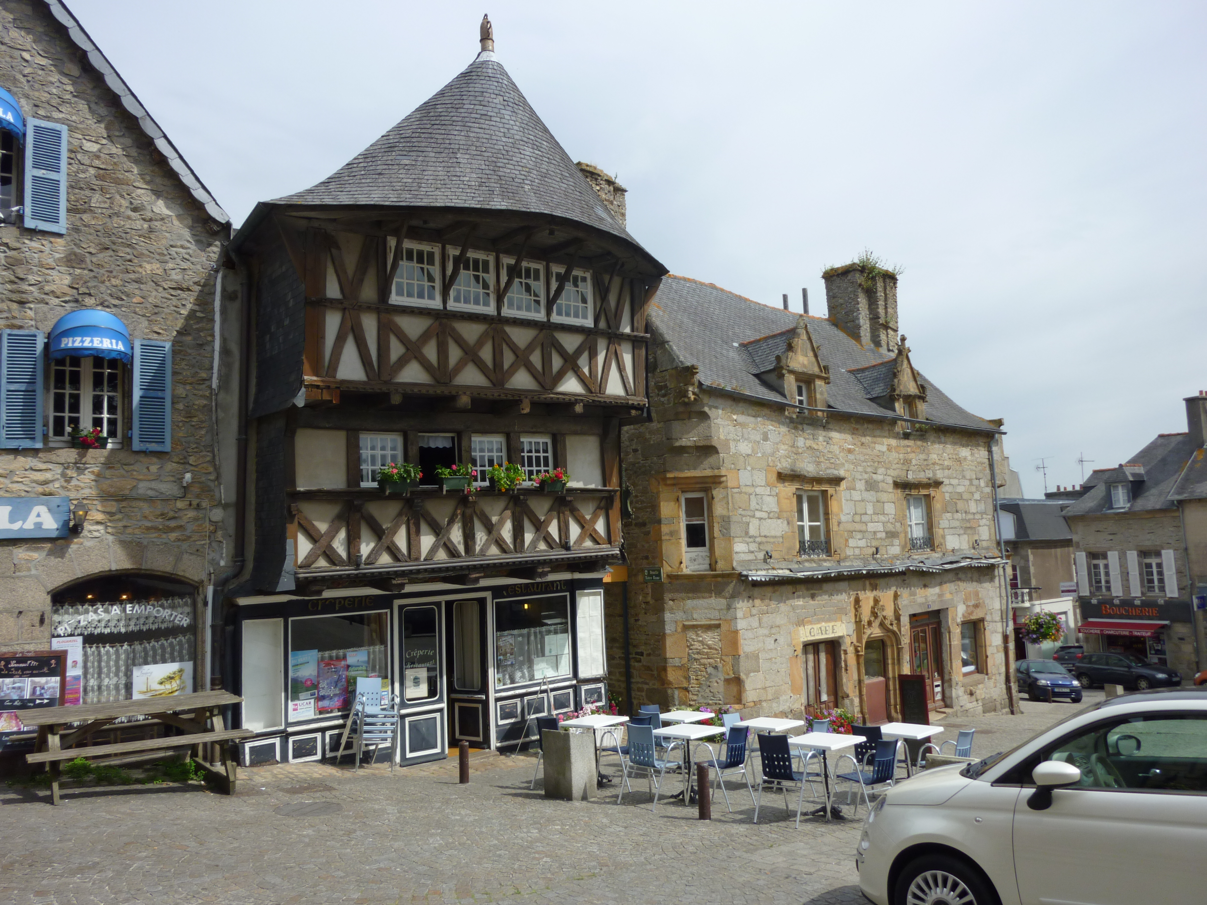 Deux des plus vieilles bâtisses du centre-ville de Saint-Renan.